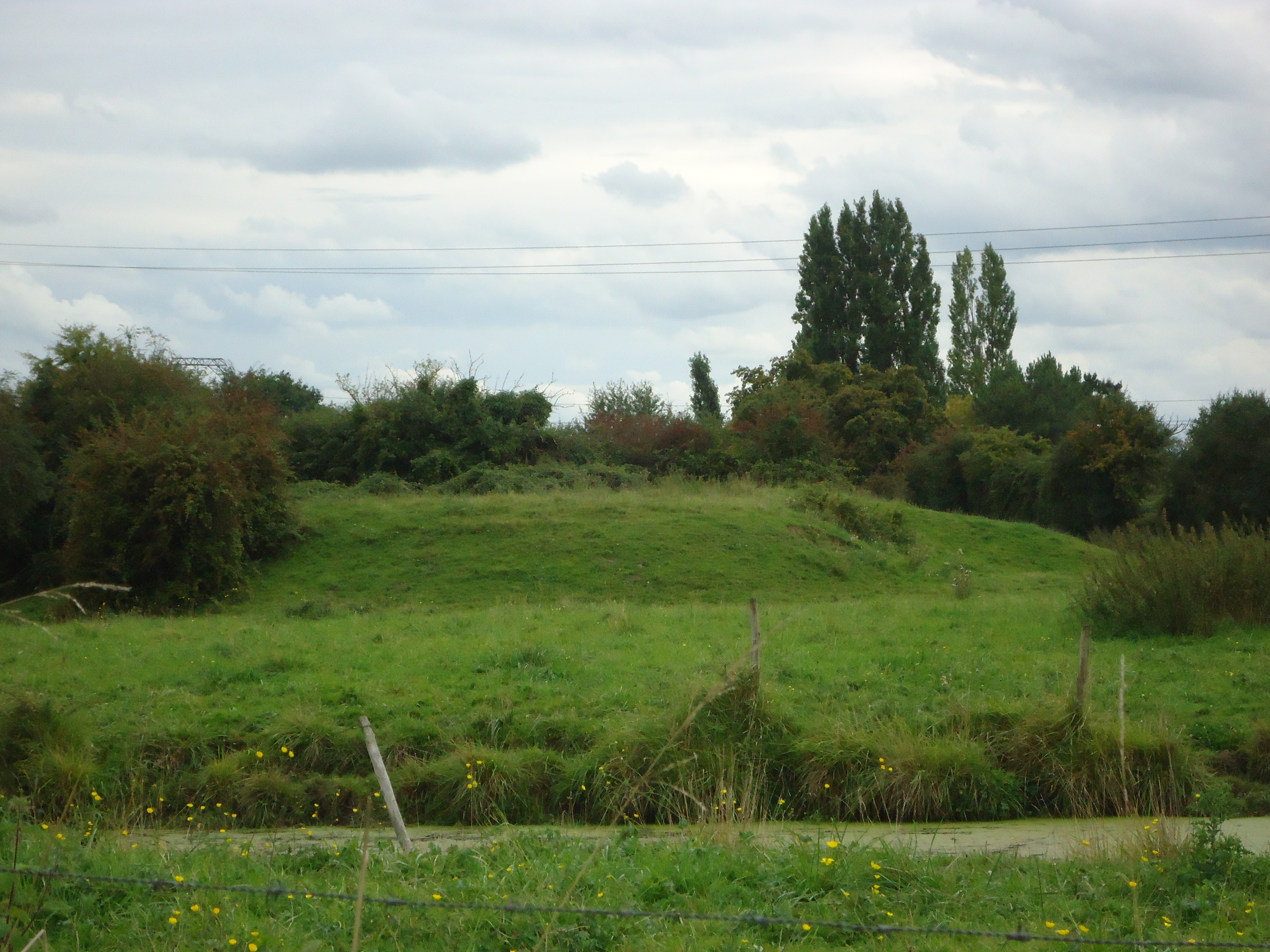 Motte castrale - Vaux - Moncé-en-Belin - Sarthe (72)